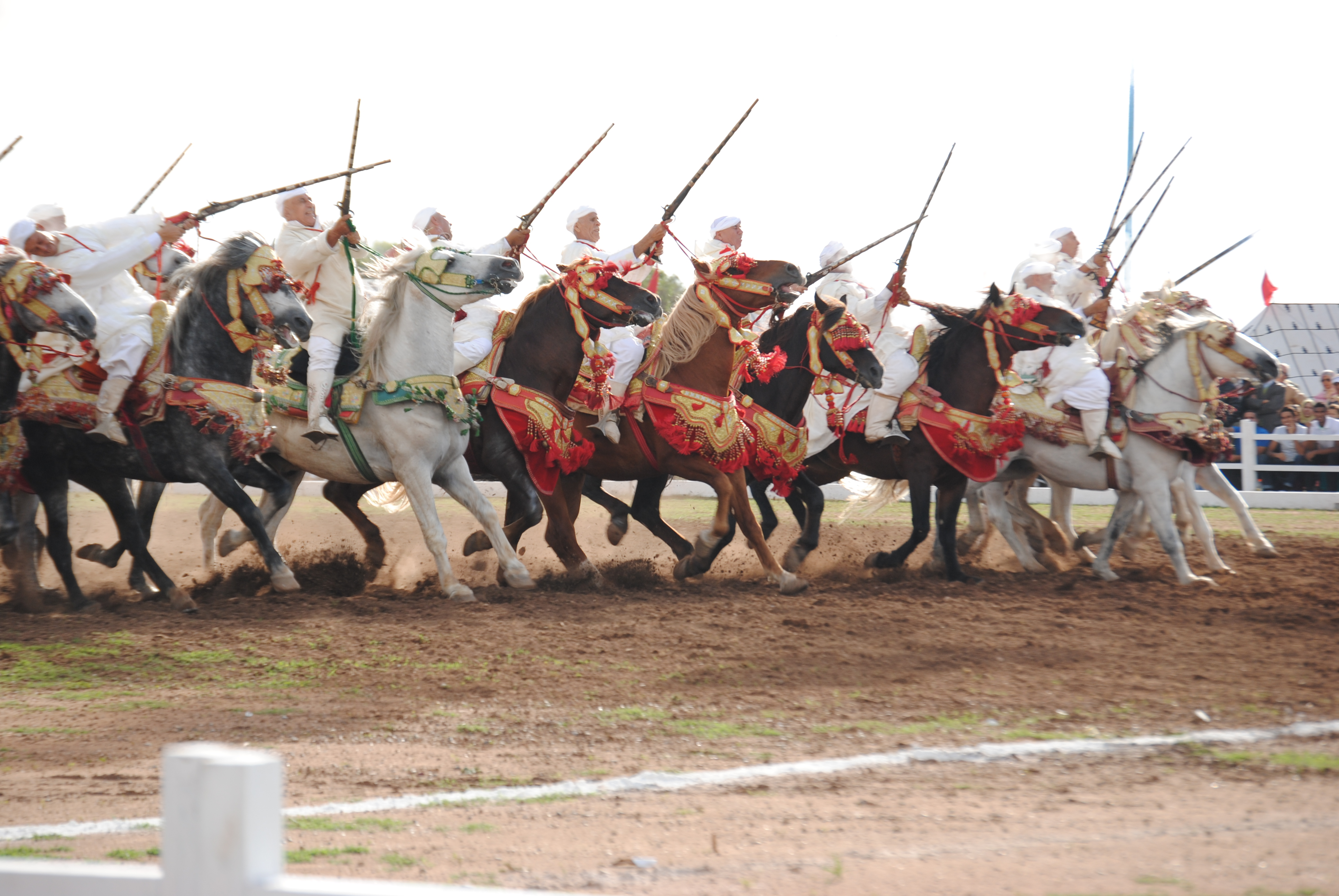 Fantasia au Festival du cheval à el Jadida - Maroc